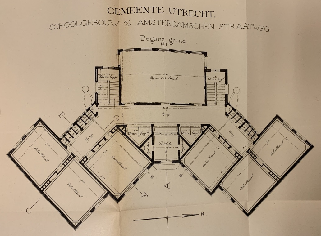 Bouwtekening horend bij het bestek voor de aanbesteding van het schoolgebouw aan de Amsterdamschen Straatweg te Utrecht (1900)